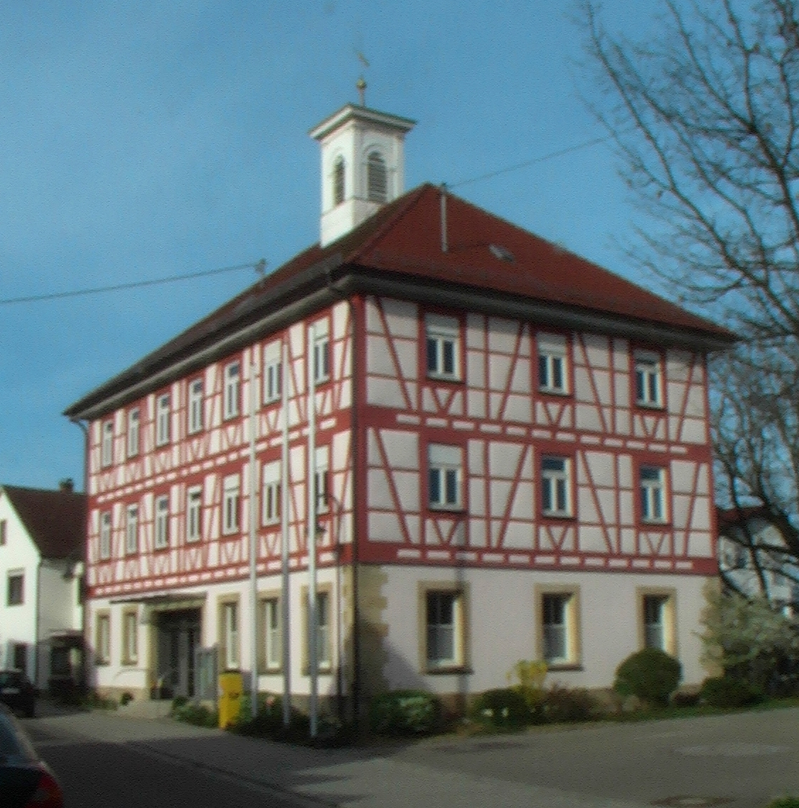 Das Rathaus von Sickenhausen mit Fachwerk, Walmdach und einem Dachreiter mit Rundbogenfenstern und Ecklisenen steht in der Eichgartenstraße 8.